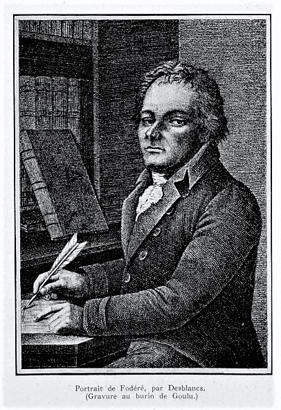 Portrait de Fodéré, par Desblancs (Gravure au burin de Goulu), Le progrès médical, 1935, supplément illustré